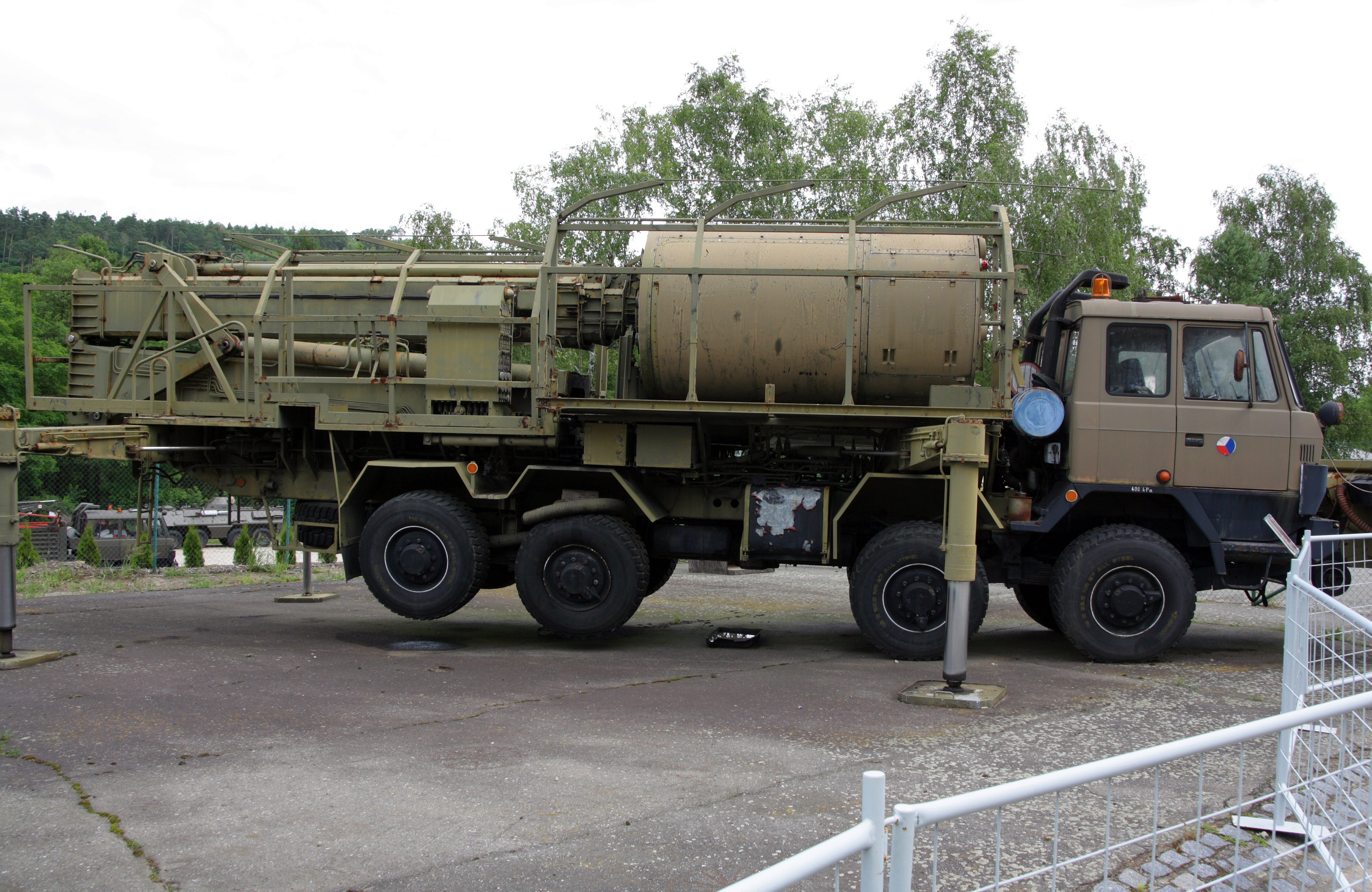 Komplet radiotechnického průzkumu vz. 86 (Tamara), anténní nosič. VTM Lešany.